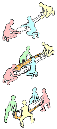 Relevage sur une planche avec rotation de la victime. Auteur : Christophe Dang Ngoc Chan (Cdang), dessin original numérisé.